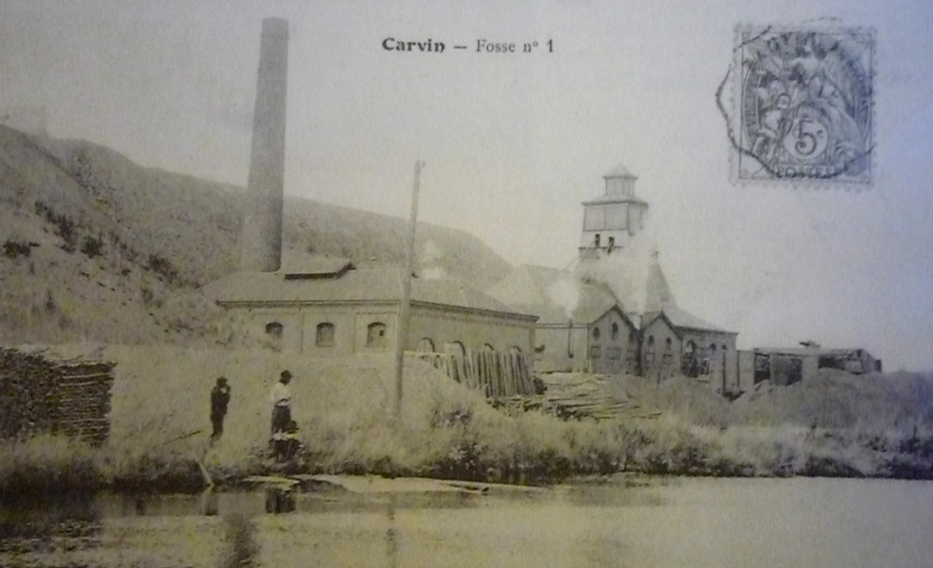 La Fosse n° 1 de la Compagnie des mines de Carvin était un charbonnage constitué d'un seul puits situé à Carvin, Pas-de-Calais, Nord-Pas-de-Calais, France.